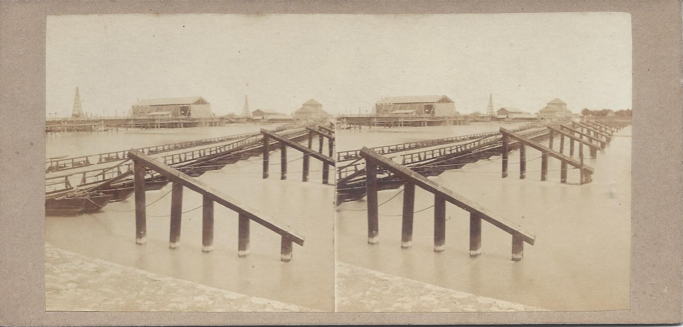 Die Pontonbrücke von Kehl im Sommer 1859. Oberhalb die im Bau befindliche bereits vorgewalzte Eisenbahnbrücke Kehl. Stereokarte von Henri-Charles Plaut au der Serie Bords du Rhin N° 20.